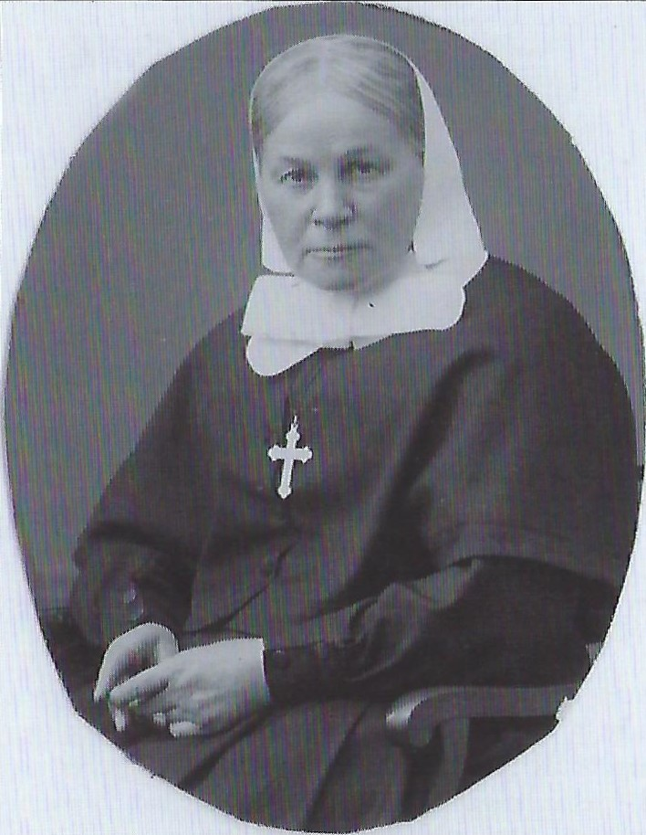 Porträtfotografie der Diakonisse Käthe Haken, von 1894 bis 1927 Vorsteherin der Höheren Töchterschule, bis 1938 Leiterin des Internats der Evangelisch-Lutherischen Diakonissenanstalt Flensburg